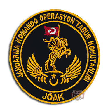 Jandarma Özel Asayiş Komutanlığı arması